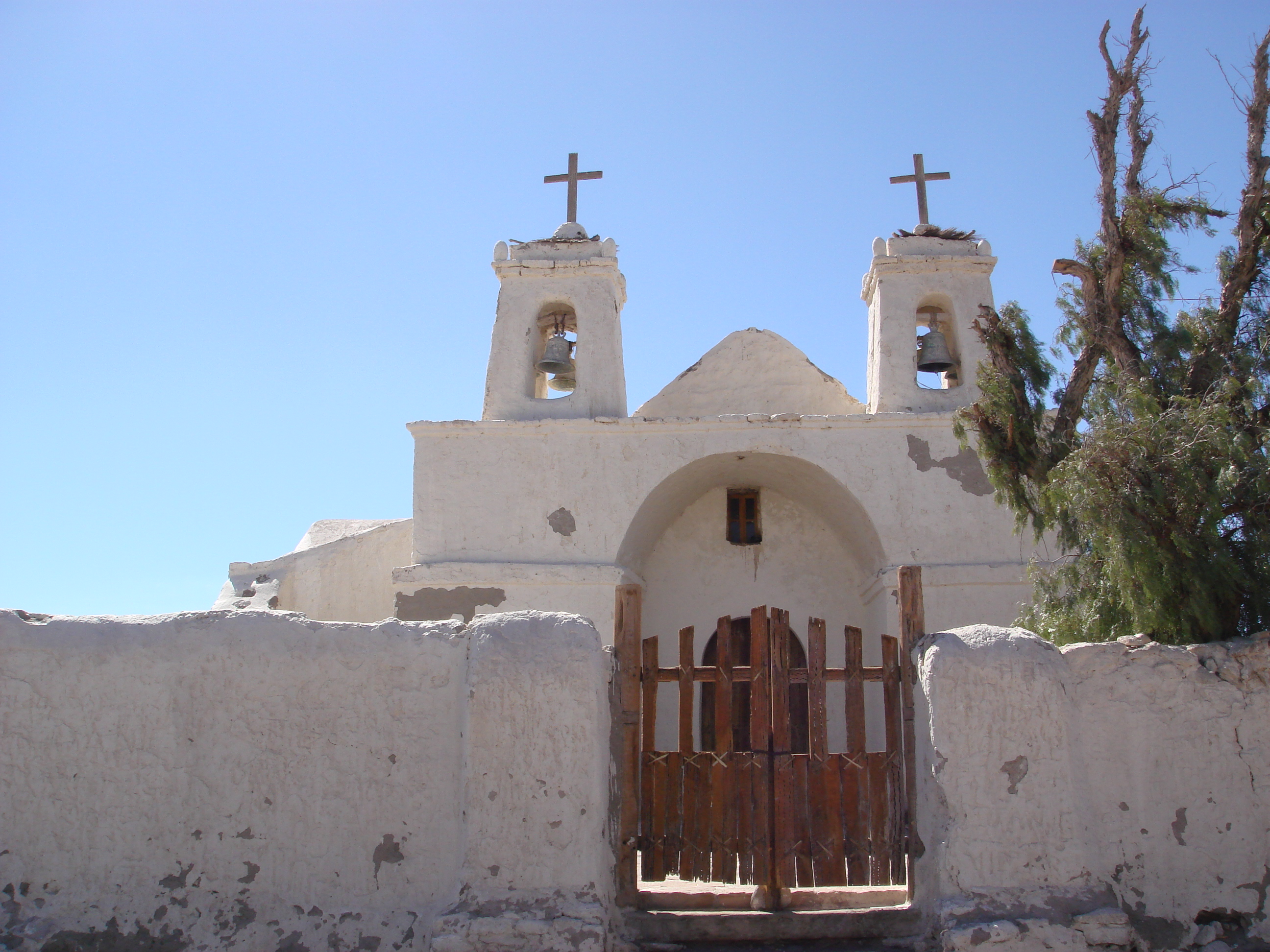 Chiu Chiu